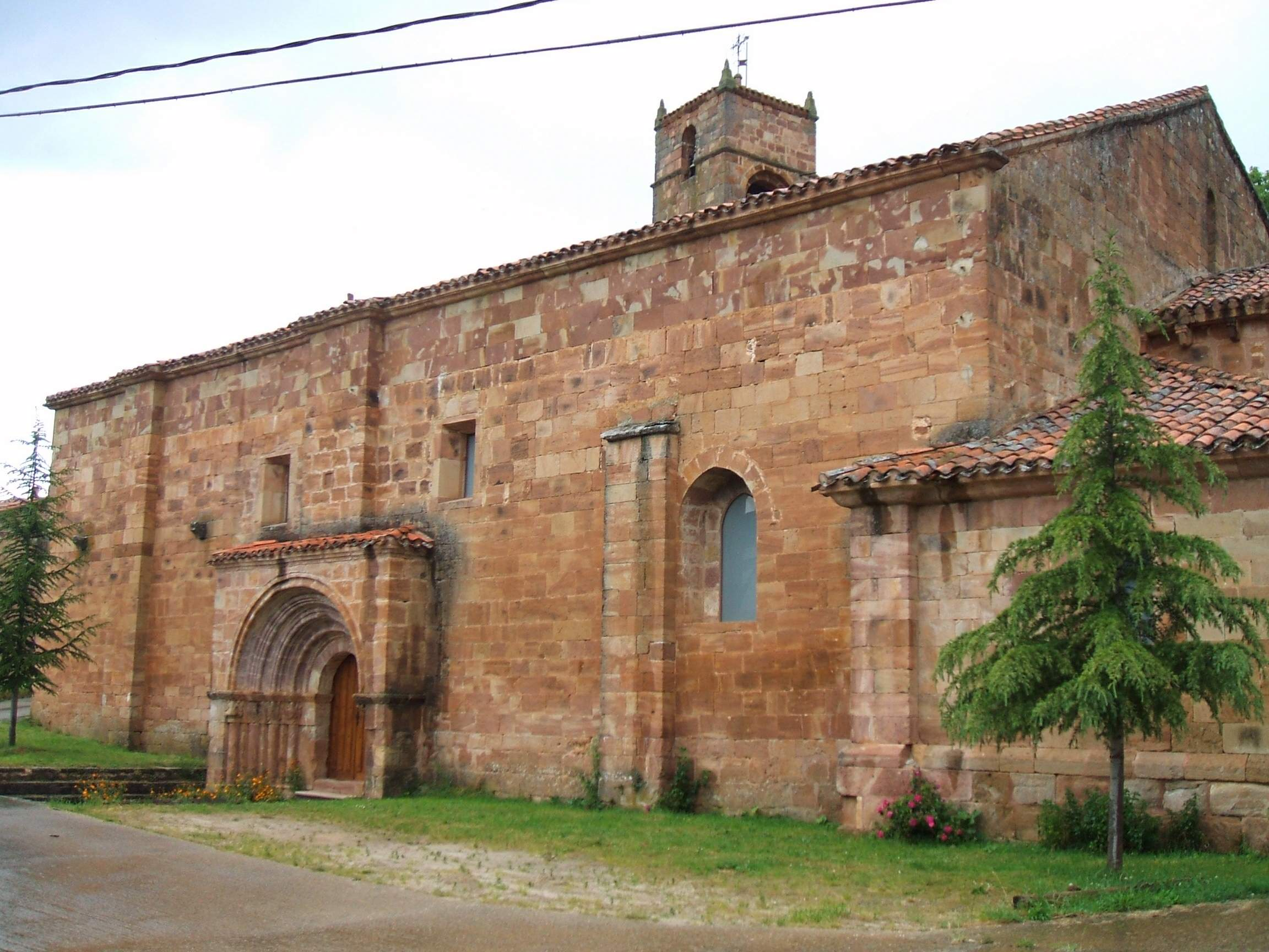 Iglesia de San Millán (San Millán de Lara, Burgos)